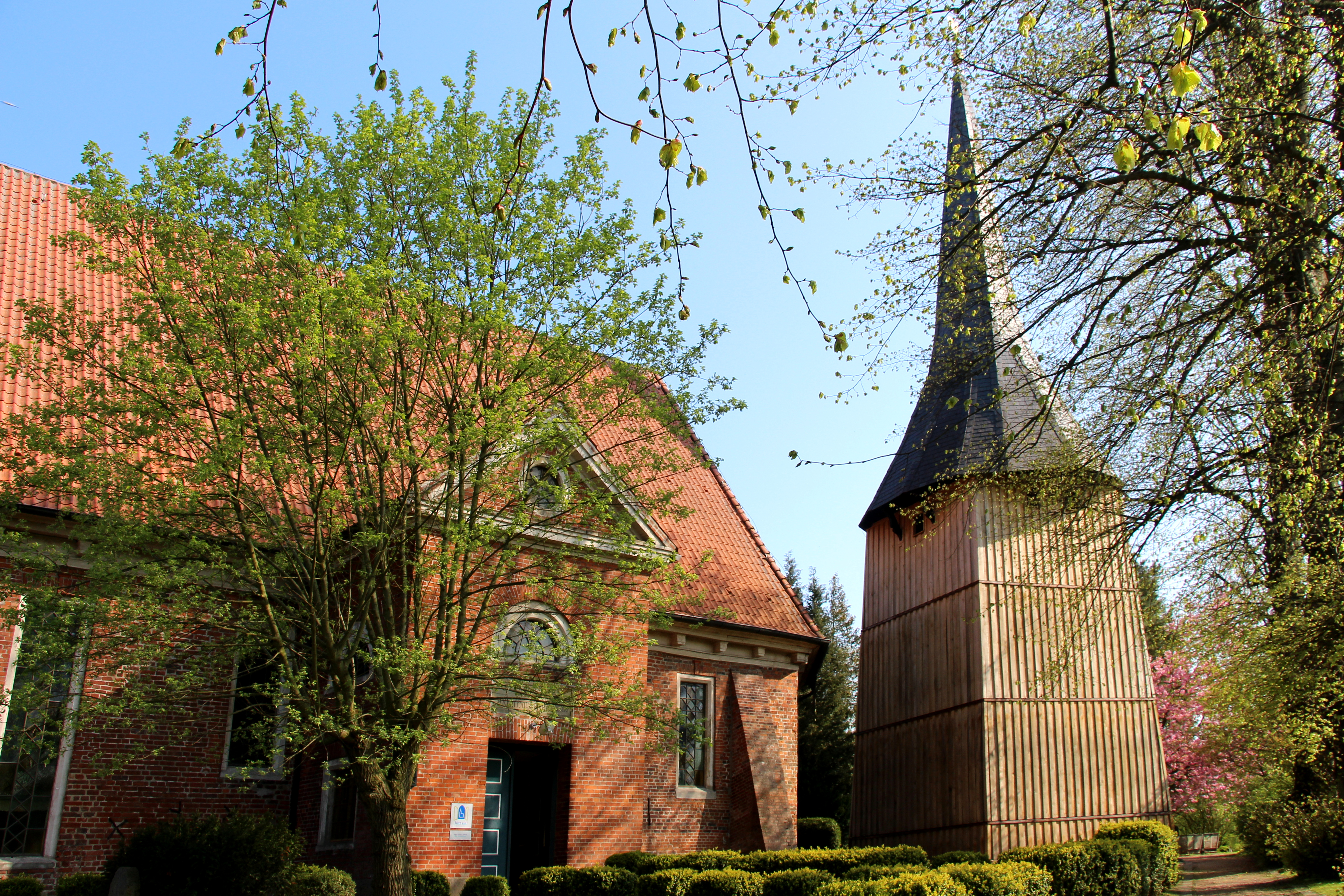 Kirchbarkau Saalkirche mit Glockenturm This is a photograph of an architectural monument.